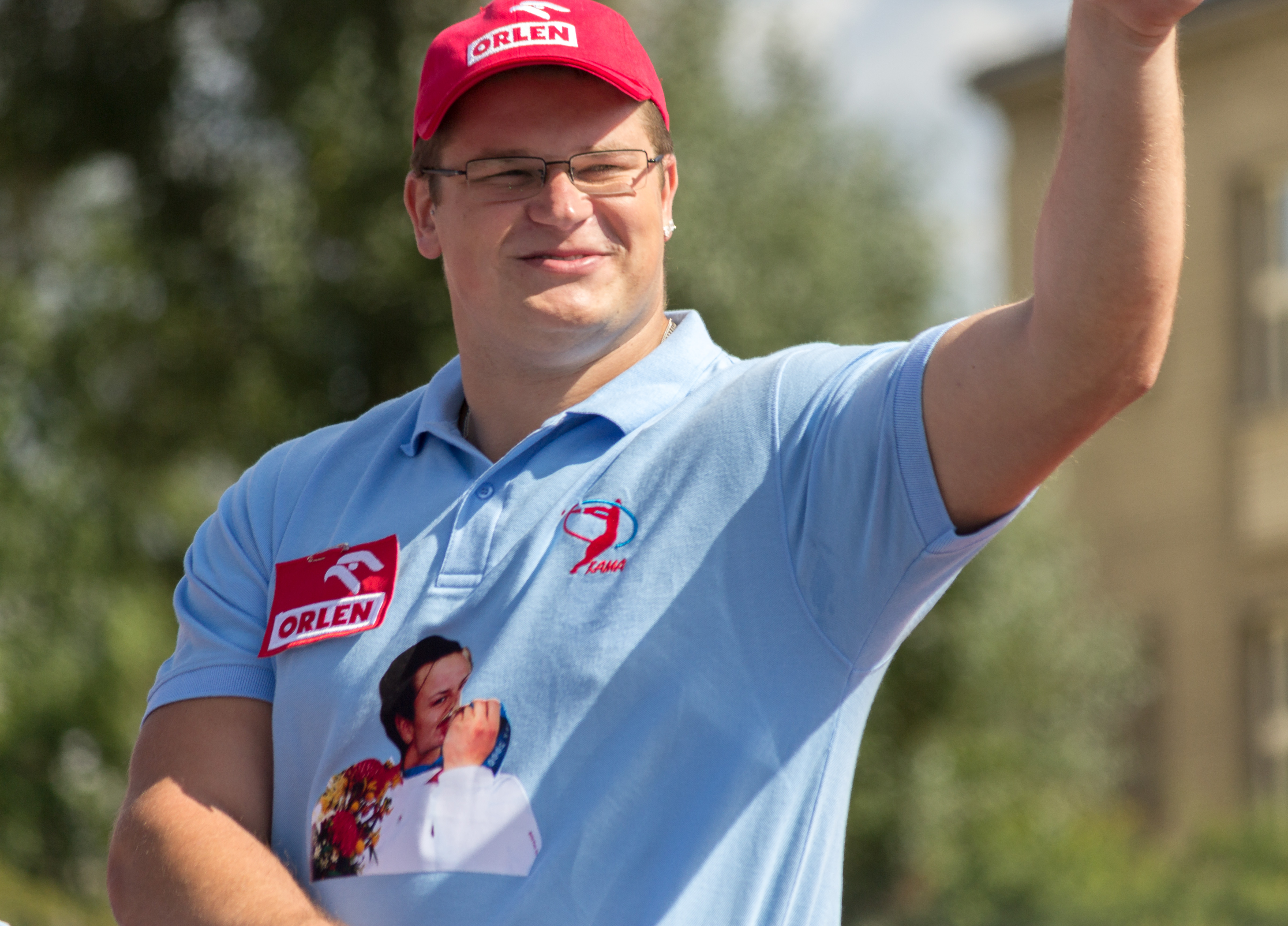 Memoriał Kamili Skolimowskiej w Warszawie, 2013-08-25